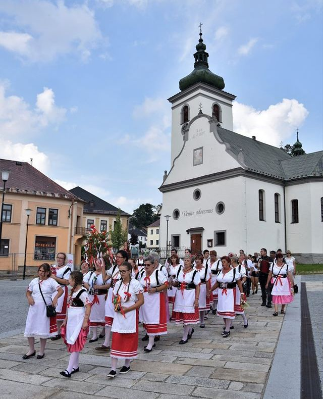 Volary konopická 2019